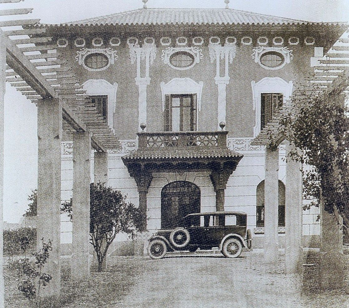 Façana del Mas del Llevat a Reus